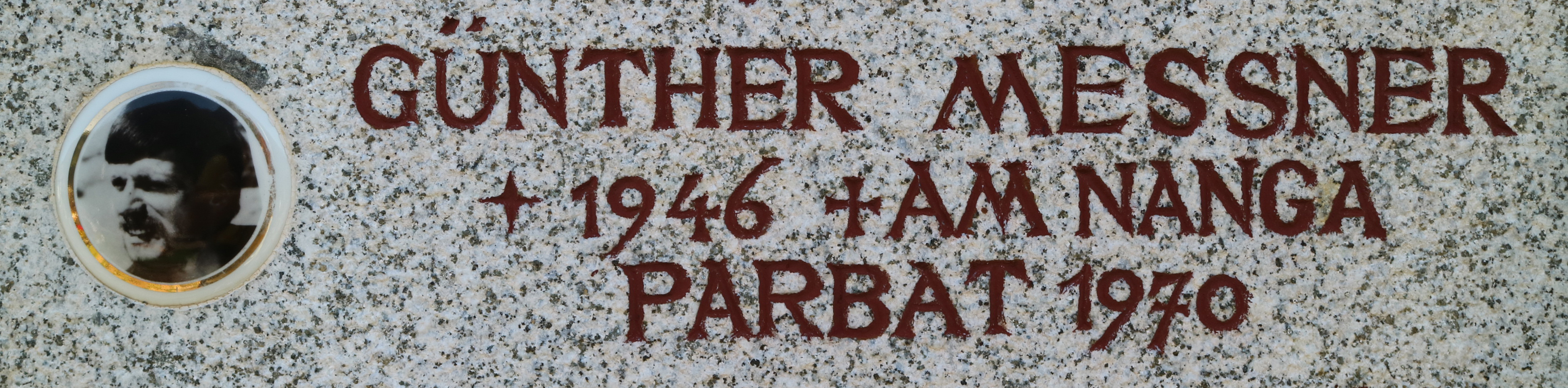 Günther Messner auf der Familientafel an der Südmauer der Pfarrkirche St. Peter in Villnöß